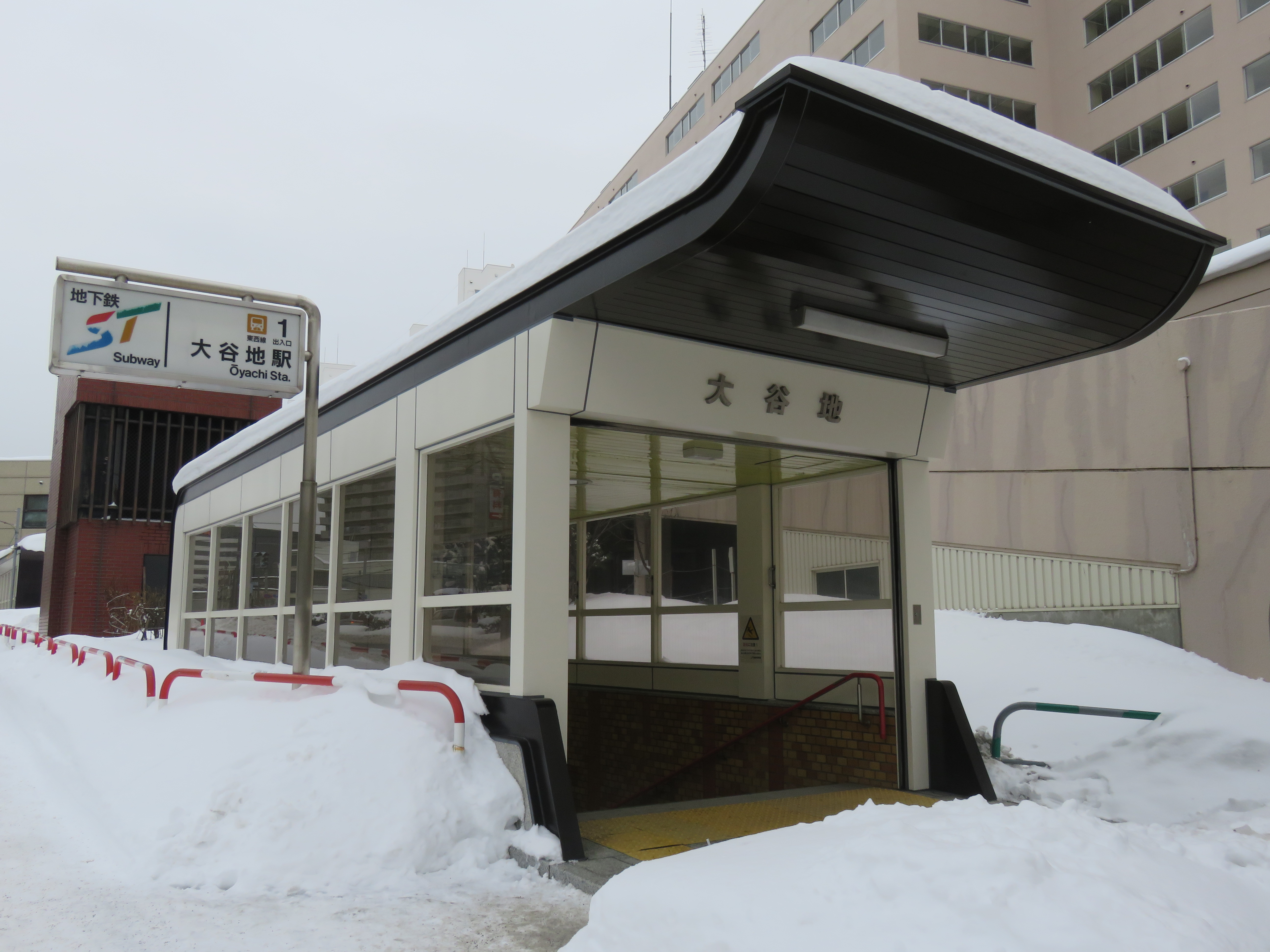 大谷地駅1番出入口